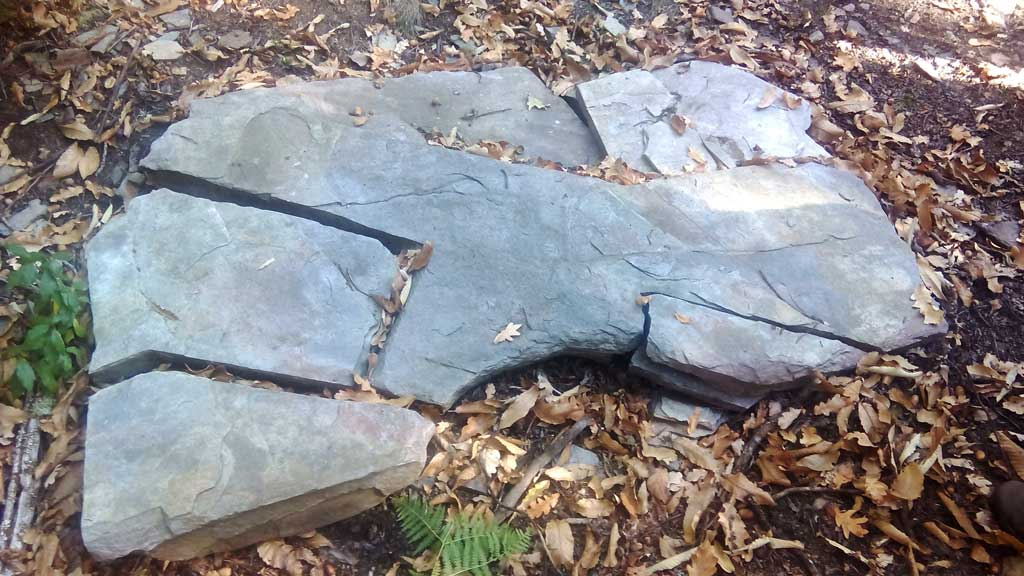 Pedra Formosa da sauna de Castañoso.